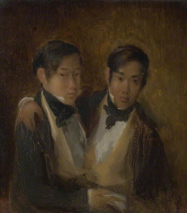 Chang and Eng Bunker